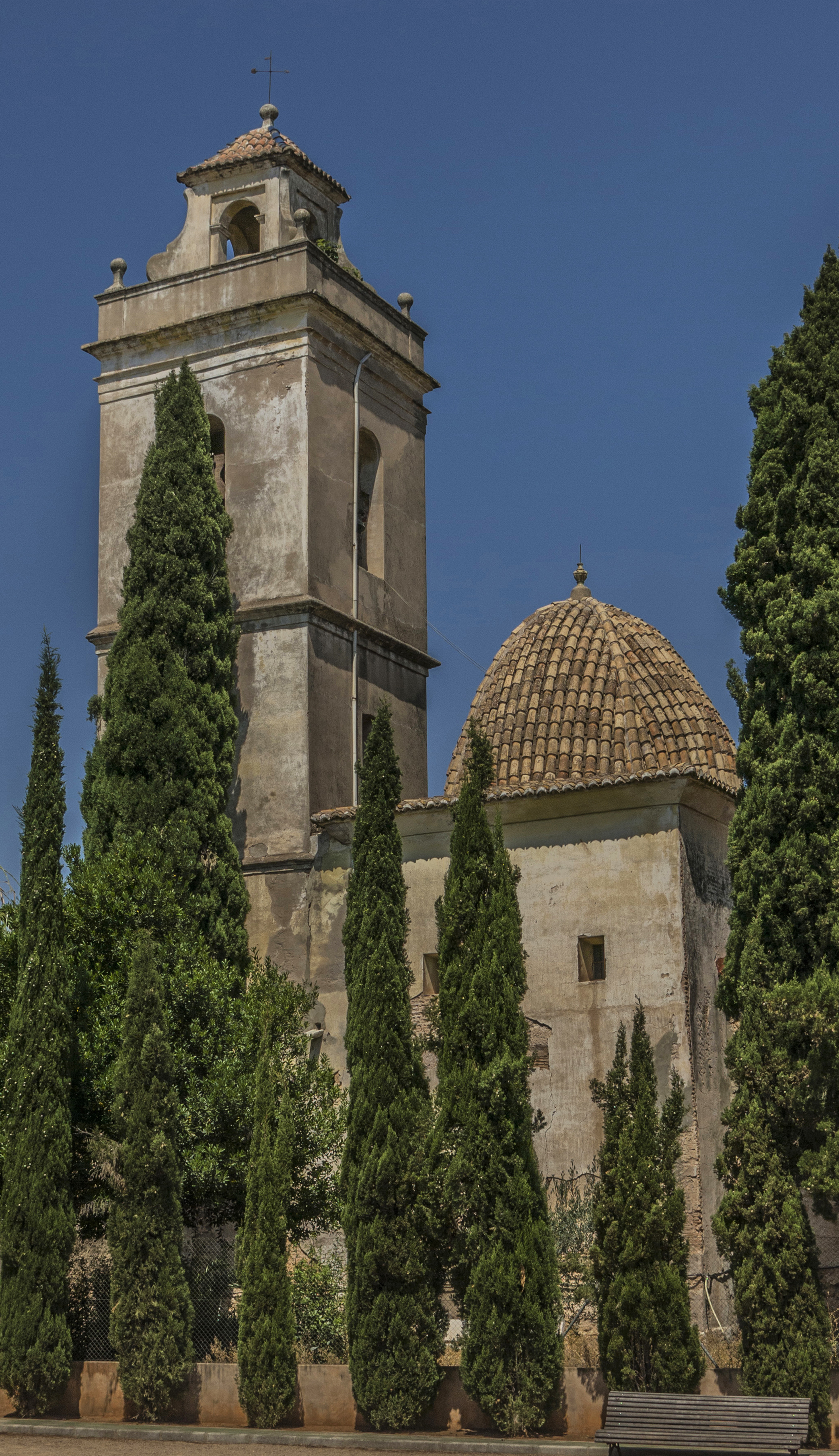 L'església parroquial de Sant Bartomeu està situada a Cogullada, nucli del terme municipal de Carcaixent (Ribera Alta, País Valencià). És un edifici religiós construït entre el final del segle XV (principis del XVI) i XVII. Posteriorment, al segle XIX, es van fer reformes: en 1854 es va construir la cúpula de la capella de la Verge de la Salut; i l'any 1873 es van dur a terme reformes a la façana, coberta i volta, i es va elevar l'altura del campanar.